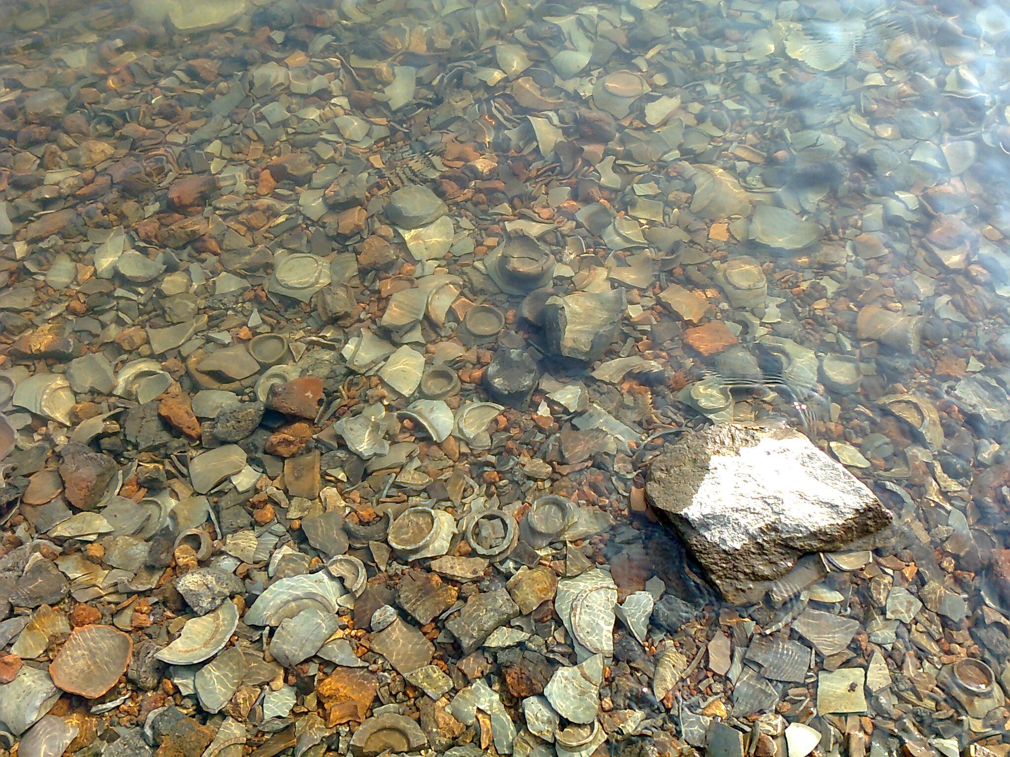 清澈的湖水与越窑陶瓷碎片